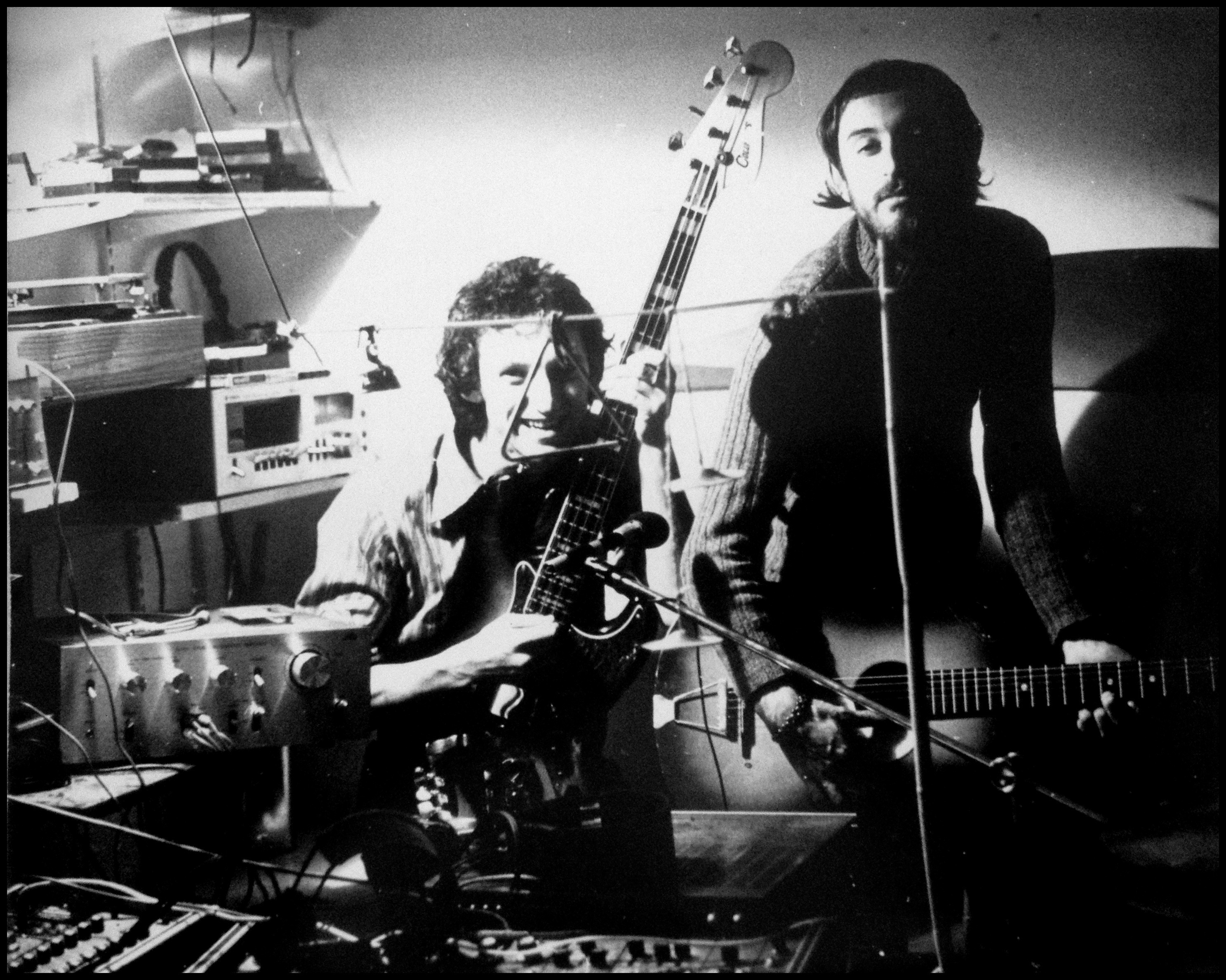 Mark and Clive Ives in their home-studio early 80's.